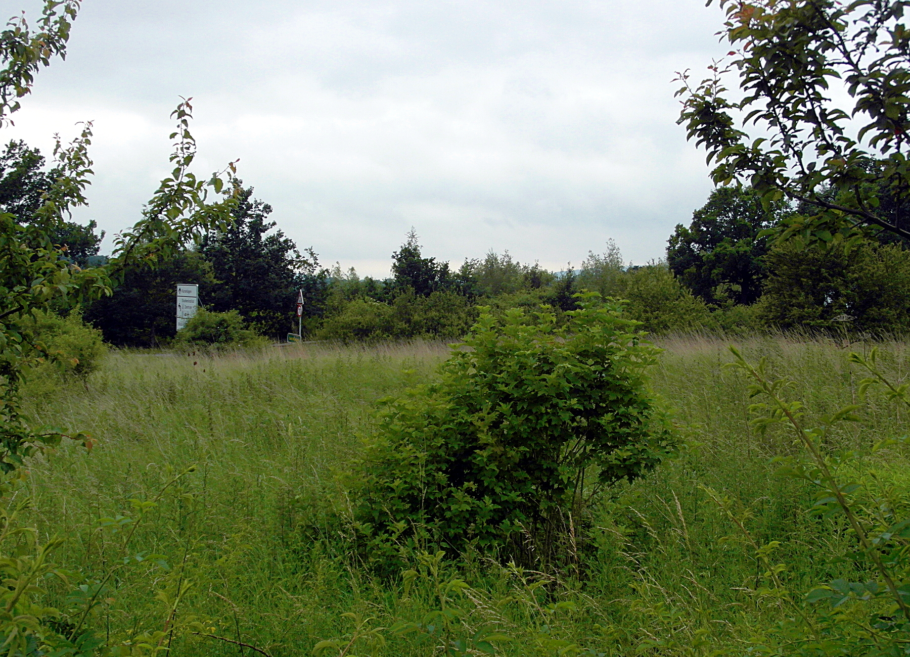 Die ehemalige St.-Annen-Kirche ist ein Bodendenkmal bei Bad Münder am Deister.